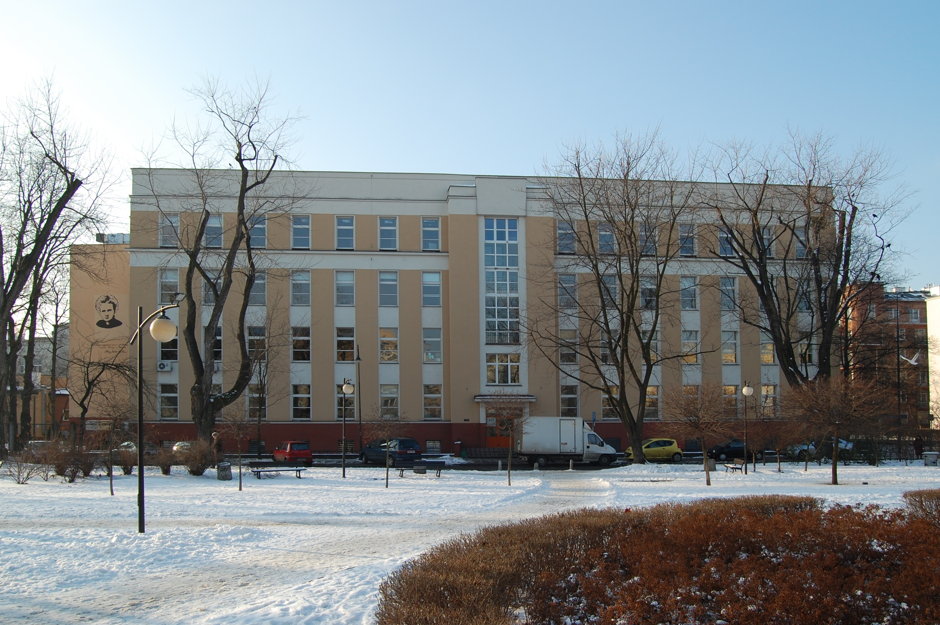 Budynek centrum onkologii przy ulicy Wawelskiej w Warszawie, dawny budynek Instytutu Radowego im. Marii Curie-Skłodowskiej.